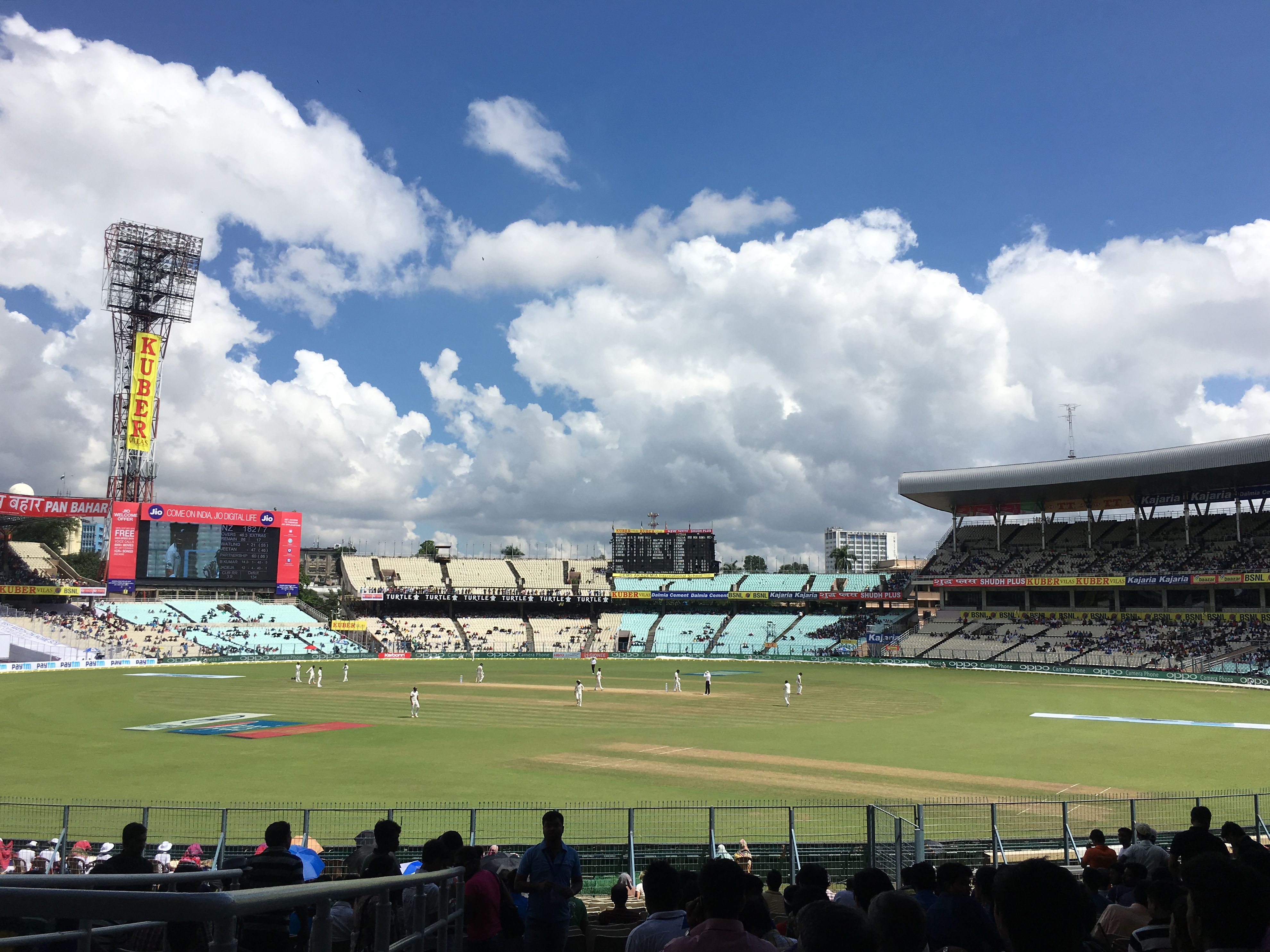 ଓଡ଼ିଆ: Eden Gardens 3rd Day 2nd Test Ind-NZ ଓଡ଼ିଆ: ଇଡେନ ଗାର୍ଡେନ୍ସ କଲିକତା, ୦୨/୧୦/୨୦୧୬ ଭାରତ ଓ ନିୟୁଜିଲାଣ୍ଡ ମଧ୍ୟରେ ଅନୁଷ୍ଠିତ ଦ୍ଵିତୀୟ ଟେଷ୍ଟ ମ୍ୟାଚ ତୃତୀୟ ଦିନ ଖେଳ ଅବସରରେ